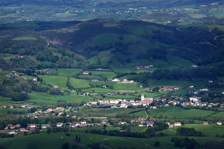 Vue du village de Sare dans les Pyrénées-Atlantiques.